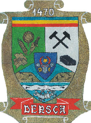 Stema comunei Dersca, județul Botoșani.